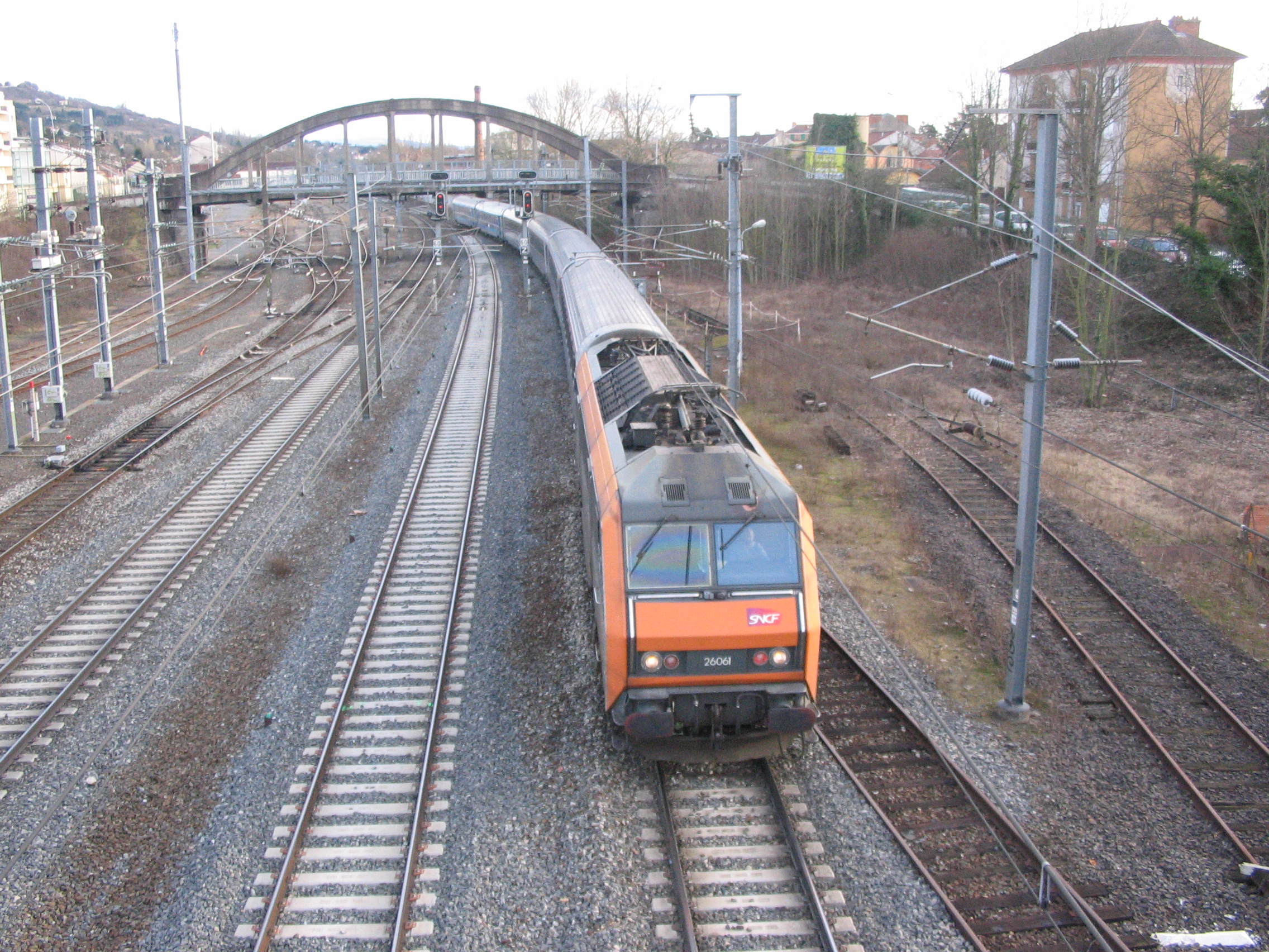 Un train IC Clermont-Paris arrive en gare de Vichy (03).